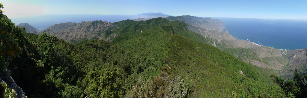 Panoramica desde el Roque Chinobre